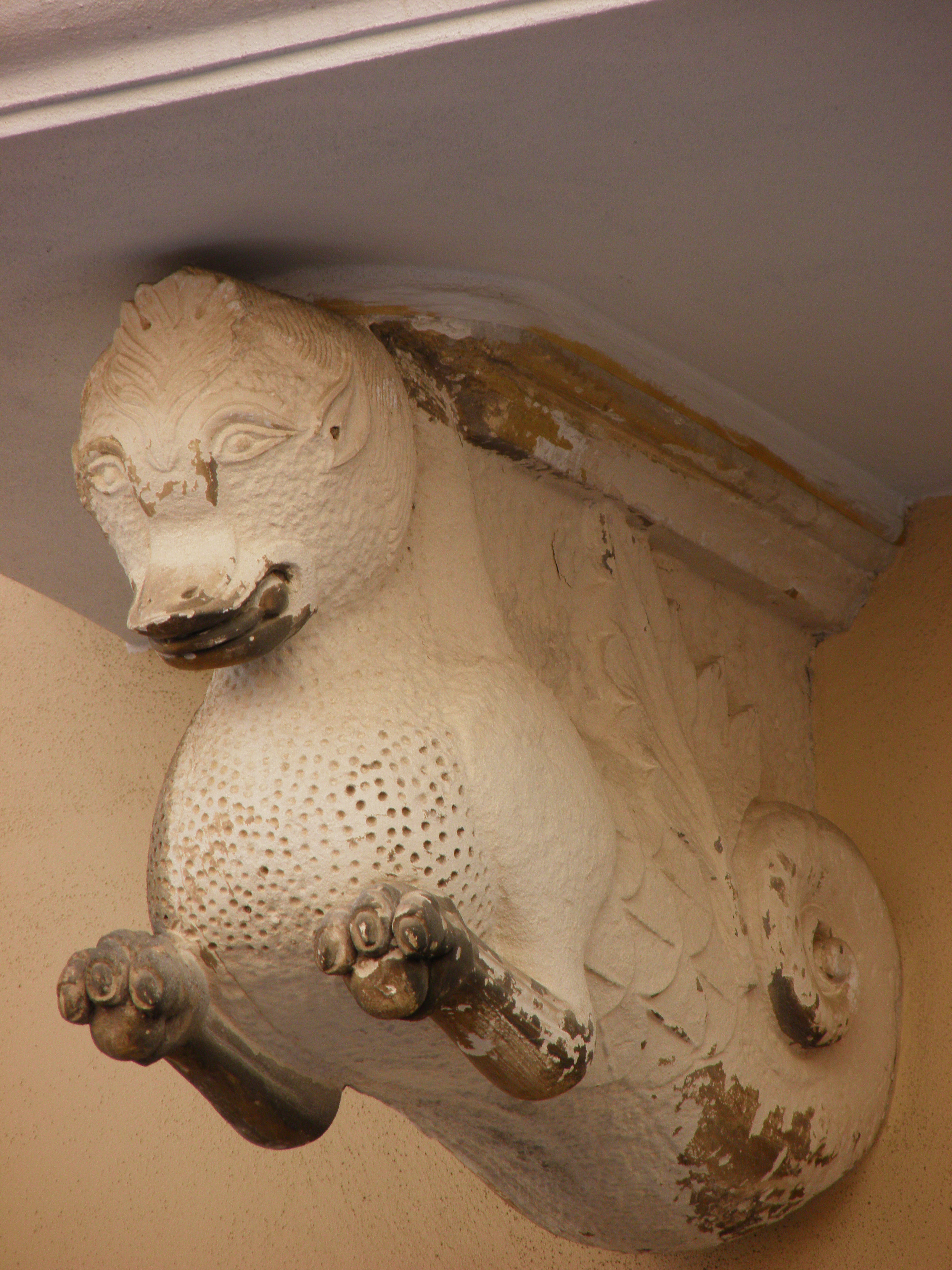 Dragone neoromanico della loggia massonica John Pitkin di Monopoli